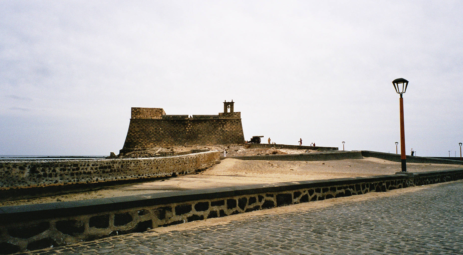 Castillo de San Gabriel, Arrecife, Lanzarote (España)